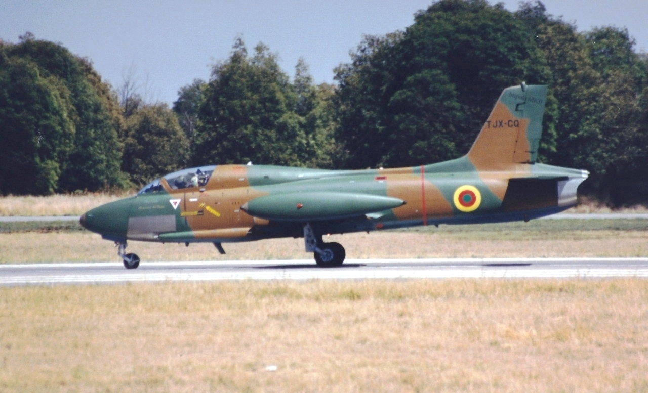 Cameroun AF MB326 Impala II TJX-CQ (Ex SAAF 1079)